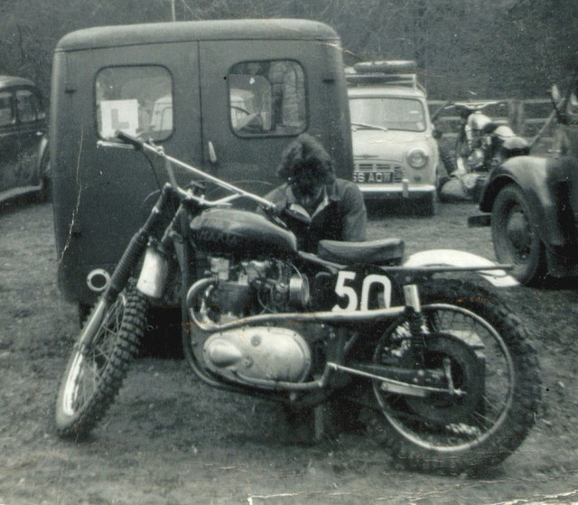 500cc pre-unit Triumph engine, BSA frame